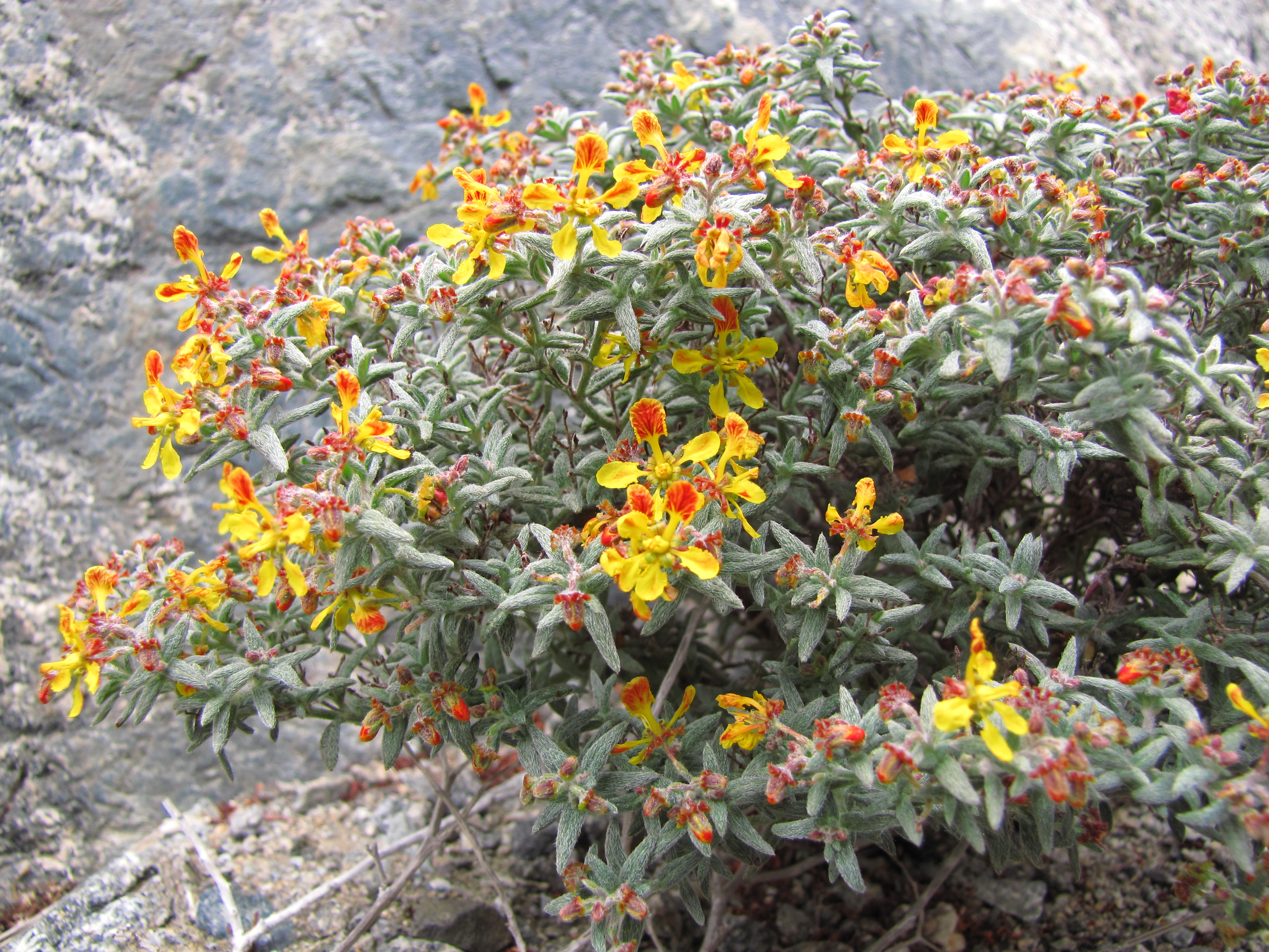 Especie fotografiada en la cordillera costera de Antofagasta Chile.